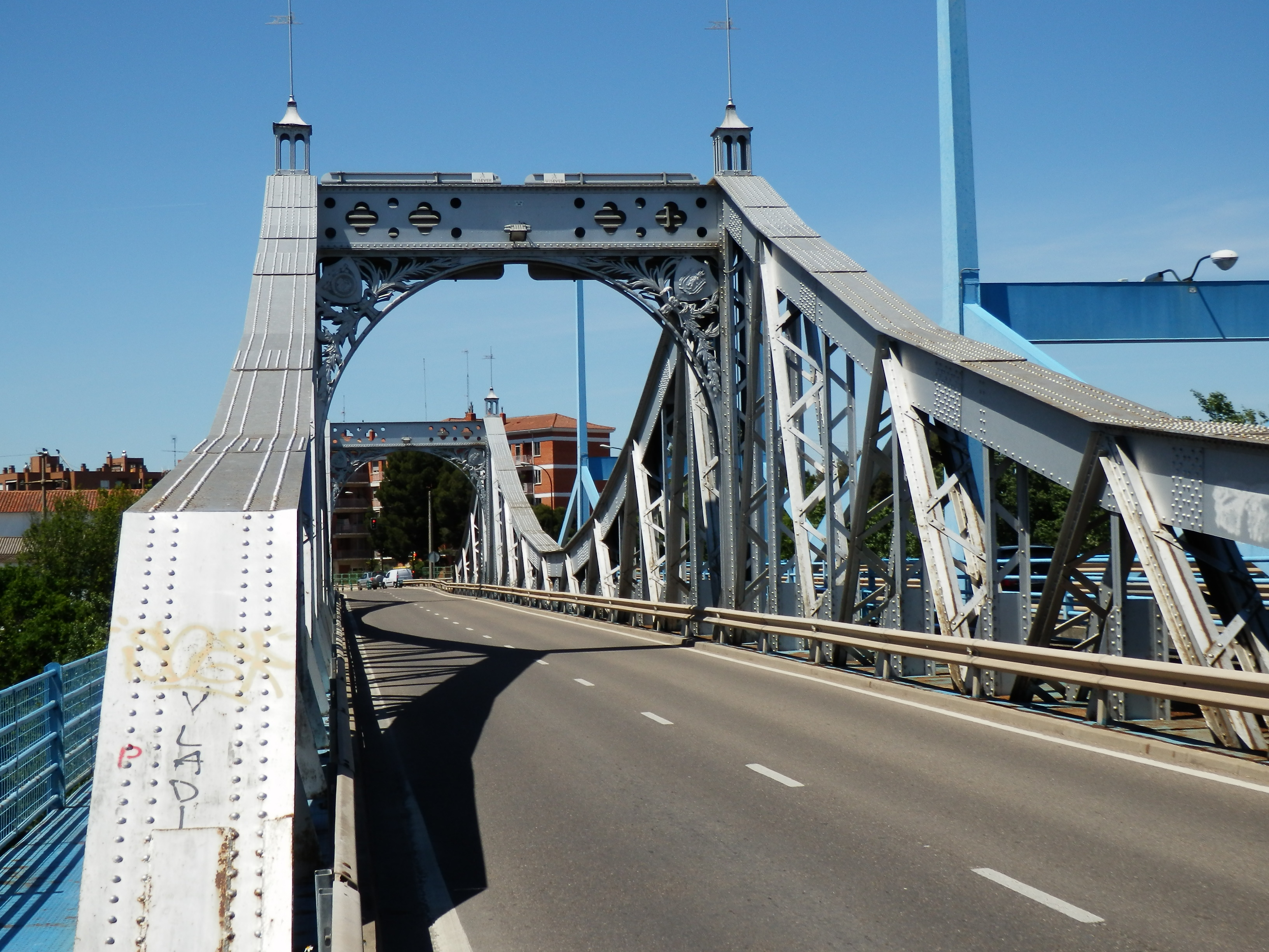 Puente sobre el río Gállego en Zaragoza.